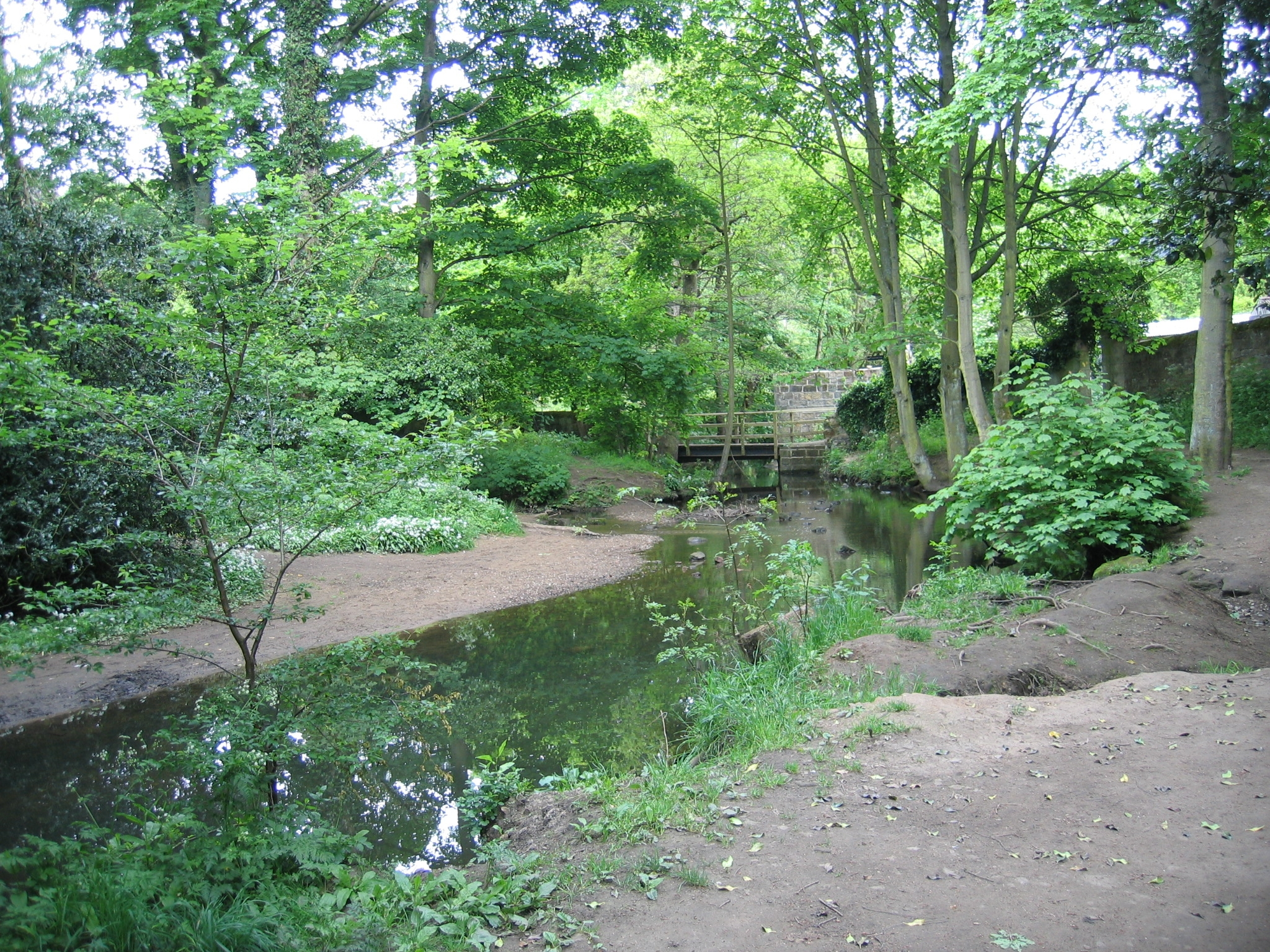 Meanwood Beck, Leeds May 2008